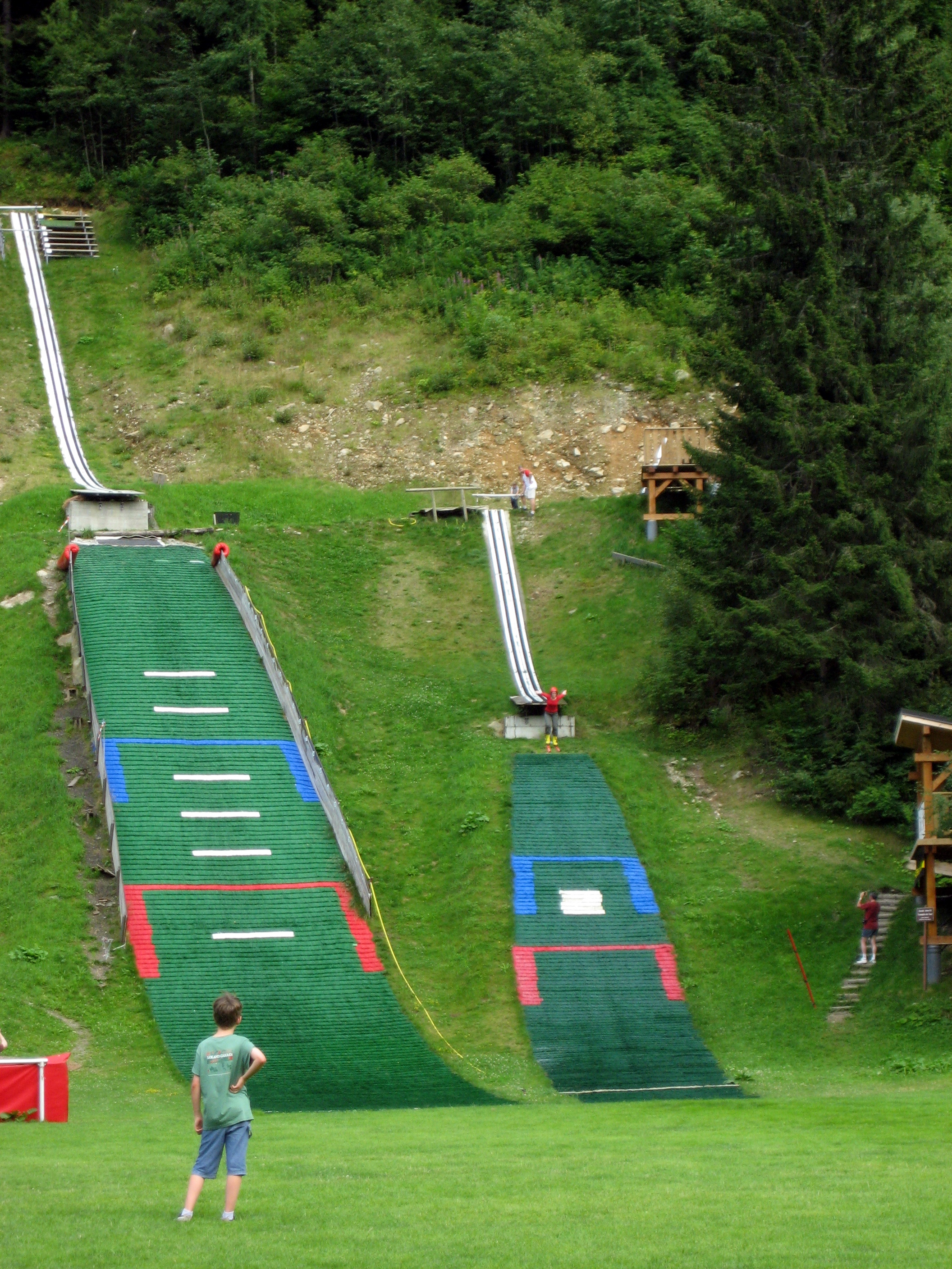 Summer jumping hills, Les Contamines-Montjoie